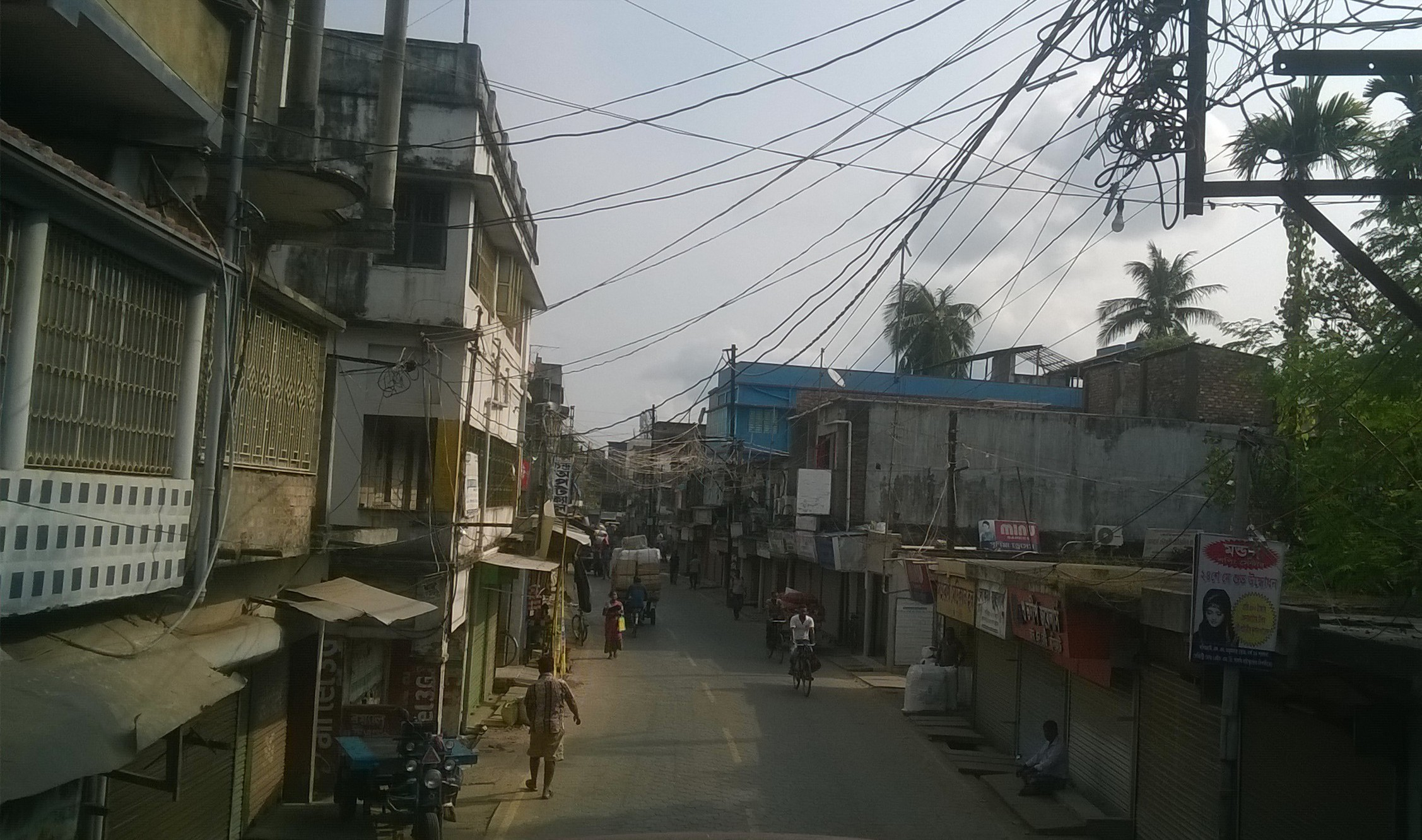 বসিরহাট শহরের একটি সড়ক পথ।(A road of Basirhat city)